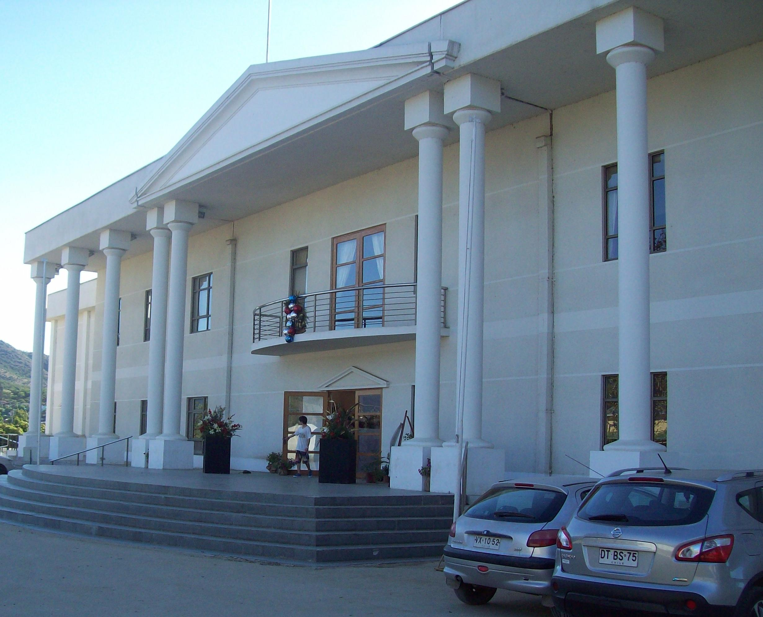 Edificio consistorial de Limache Ilustre Municipalidad de Limache